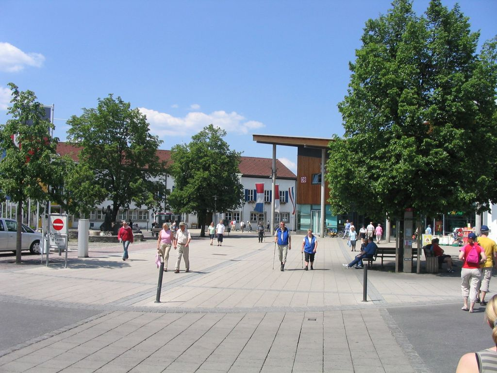 Bahnhofsvorplatz Oberstdorf